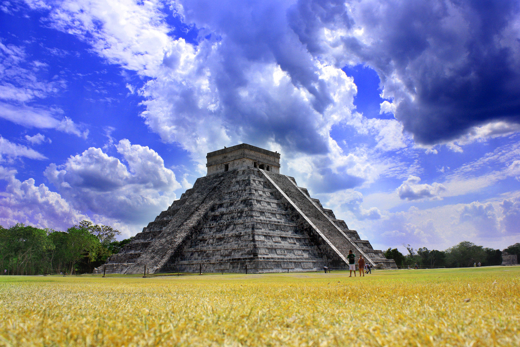 Fotografía HDR (Chichen Itzá)